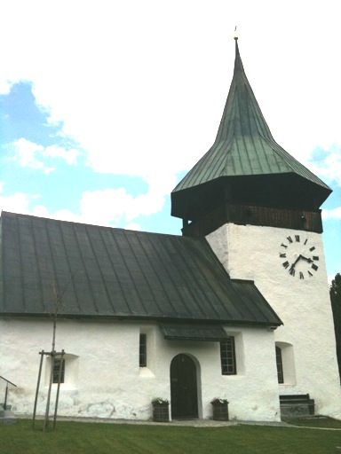 reformierte Kirche Davos Glaris, Kanton Graubünden